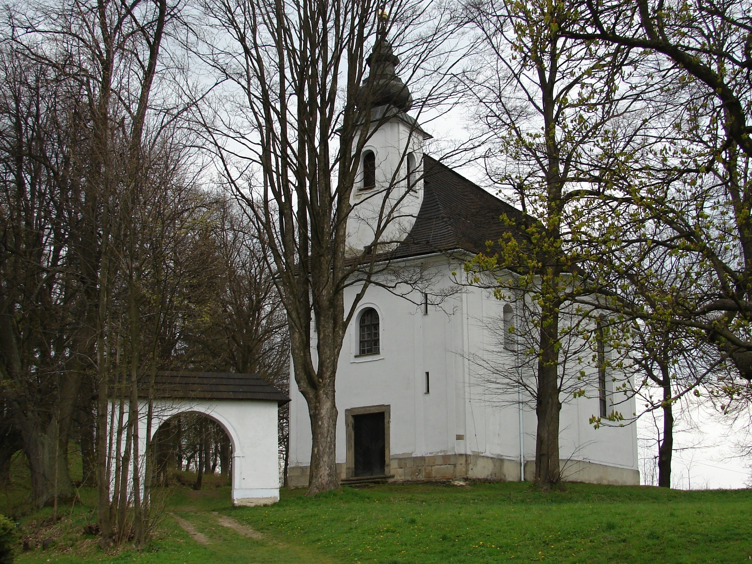 Kostel Povýšení sv. Kříže s areálem Křížového vrchu, s omezením: bez sloupů veř. osvětlení, domku na parc. č. 1767, domku zahradníka čp.205 na parc. č. 1768, stanice GSM na parc. č.1769, podium (Moravský Beroun), S okraj města, Moravský Beroun